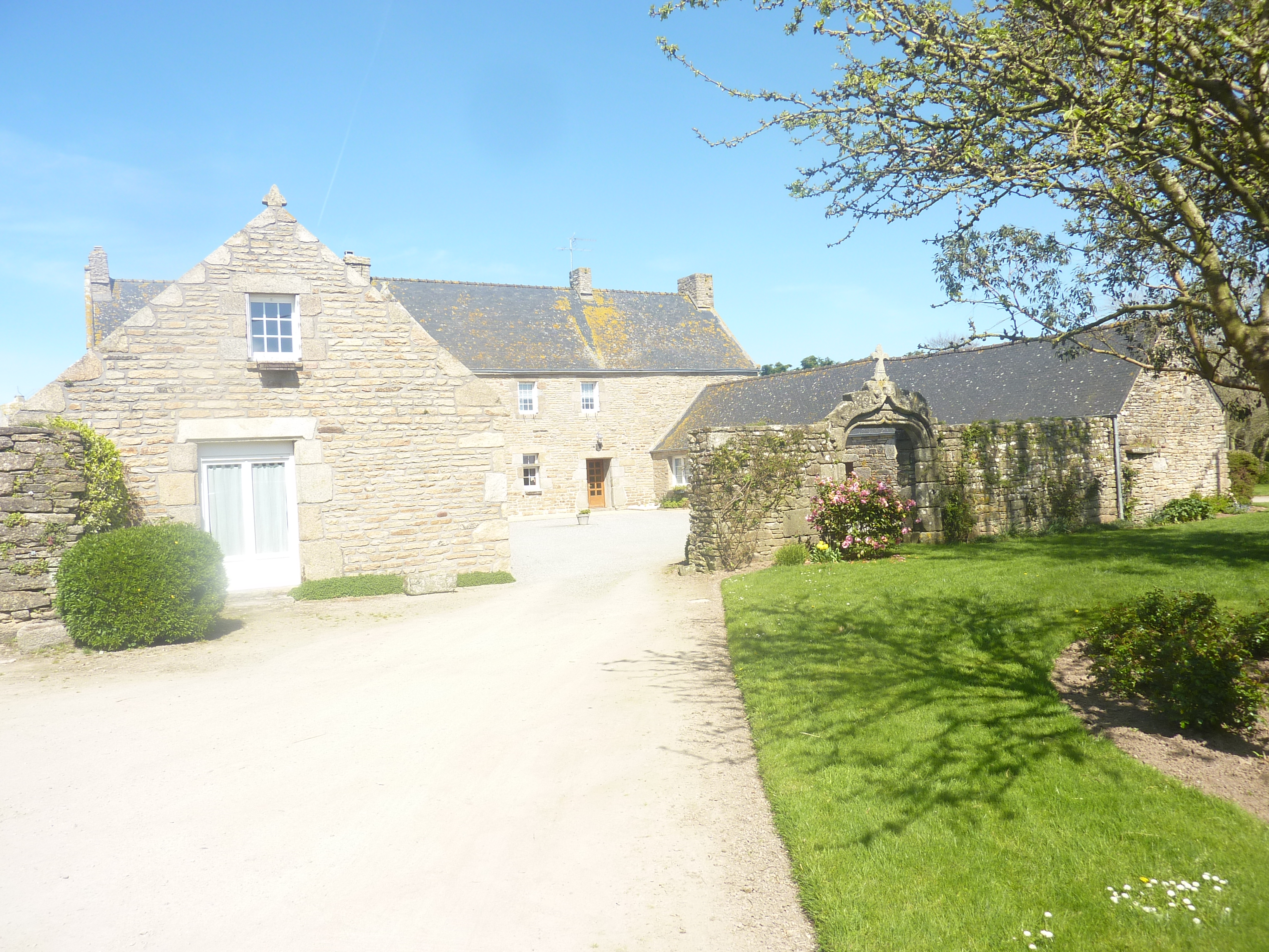 Porte ogivale et maison ancienne près de l'enclos paroissial Saint-Léonor de Larret (commune de Pospoder).